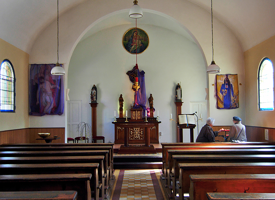 Maria Grün, Wien. Inneres der Kirche.